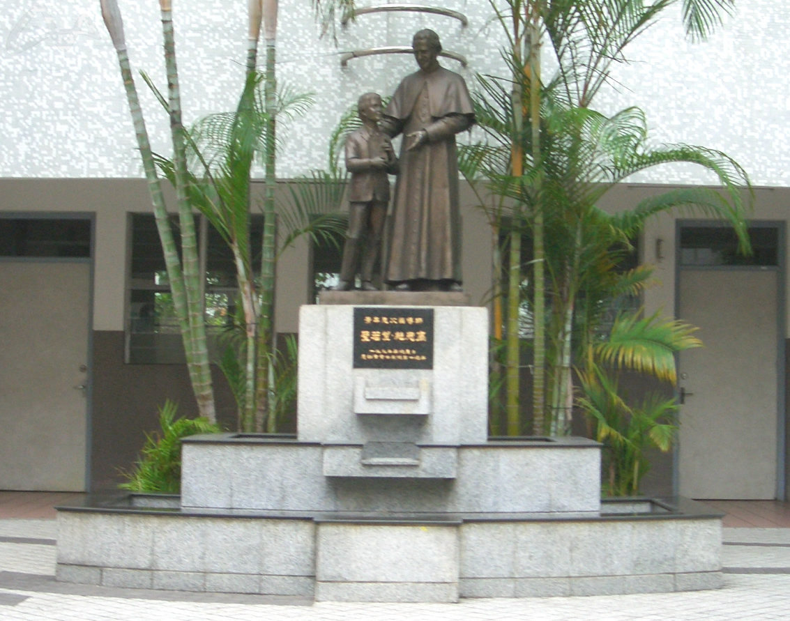 粵華中學納德樓B2層的聖鮑思高像。